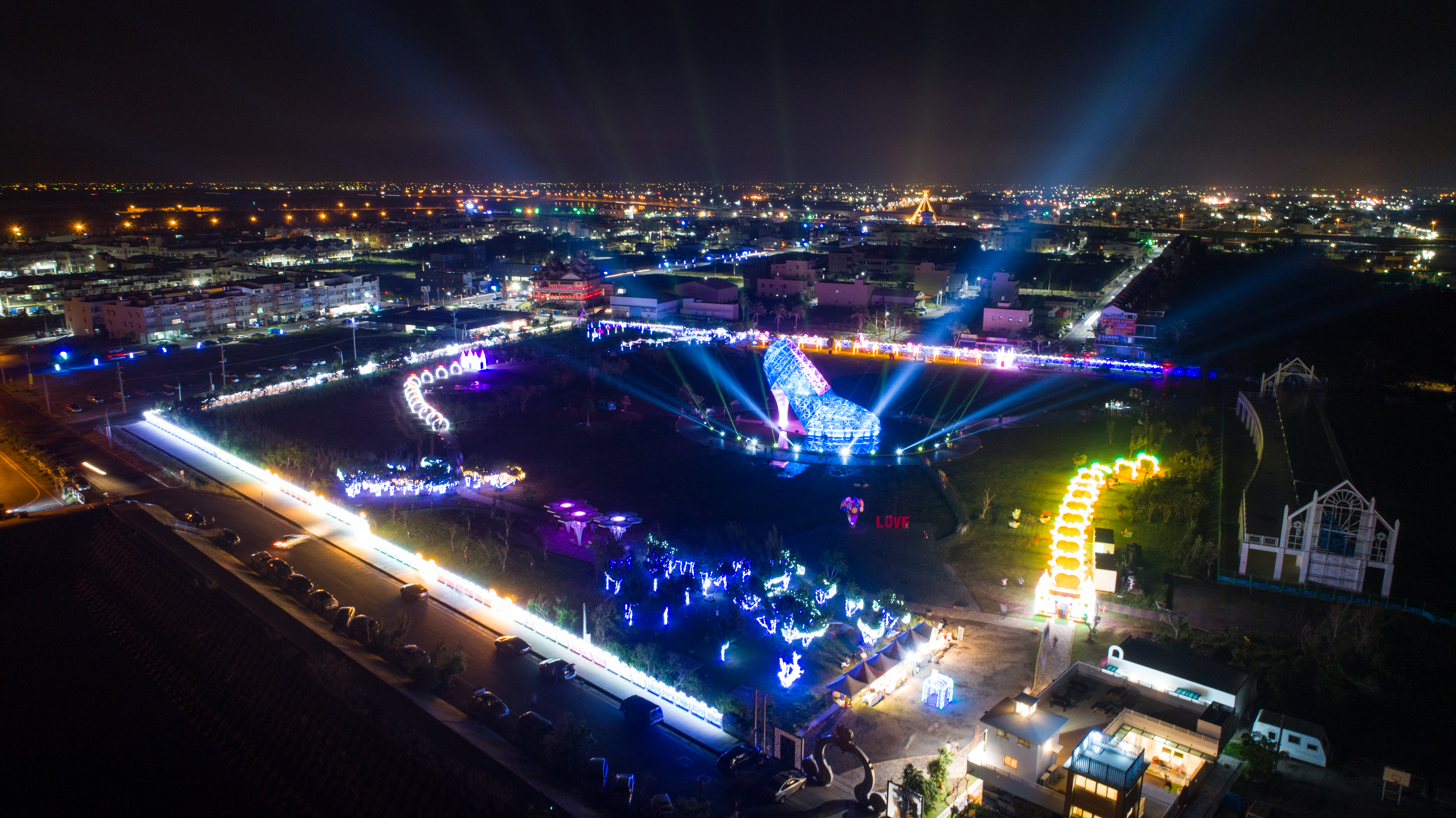 高根鞋教堂園區空拍實景